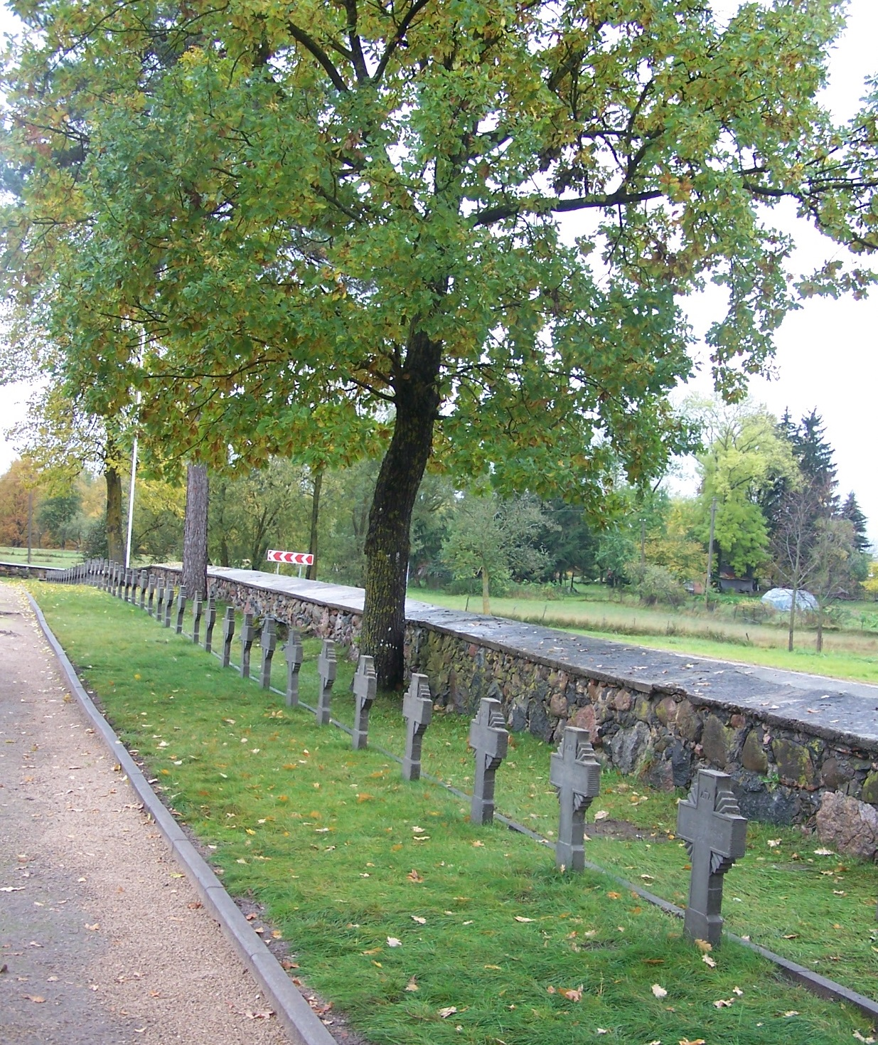 Lietuvos karių kapinės Kupiškyje